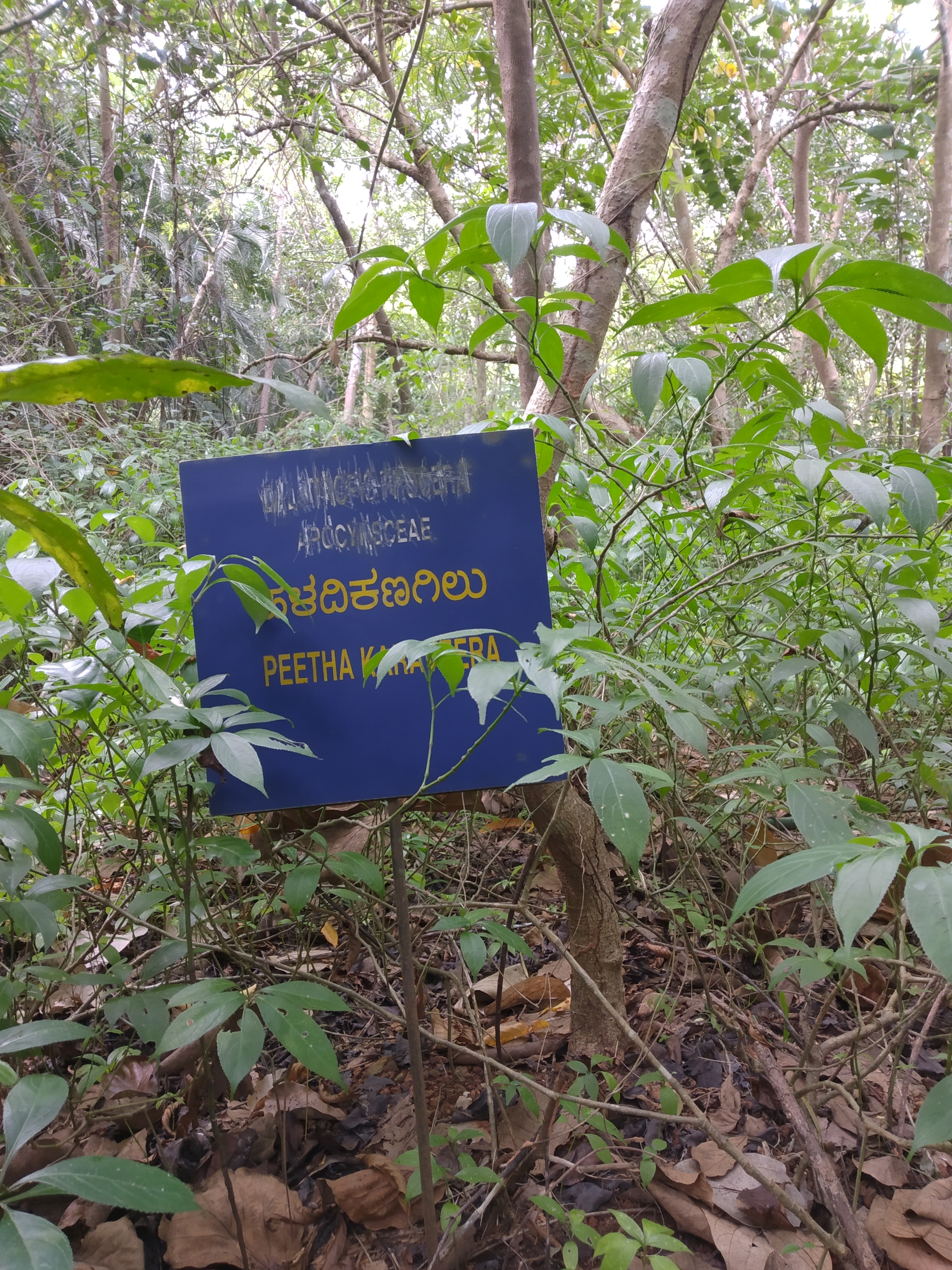 ಕನ್ನಡ: ಹಳದಿಕಣಗಿಲೆ